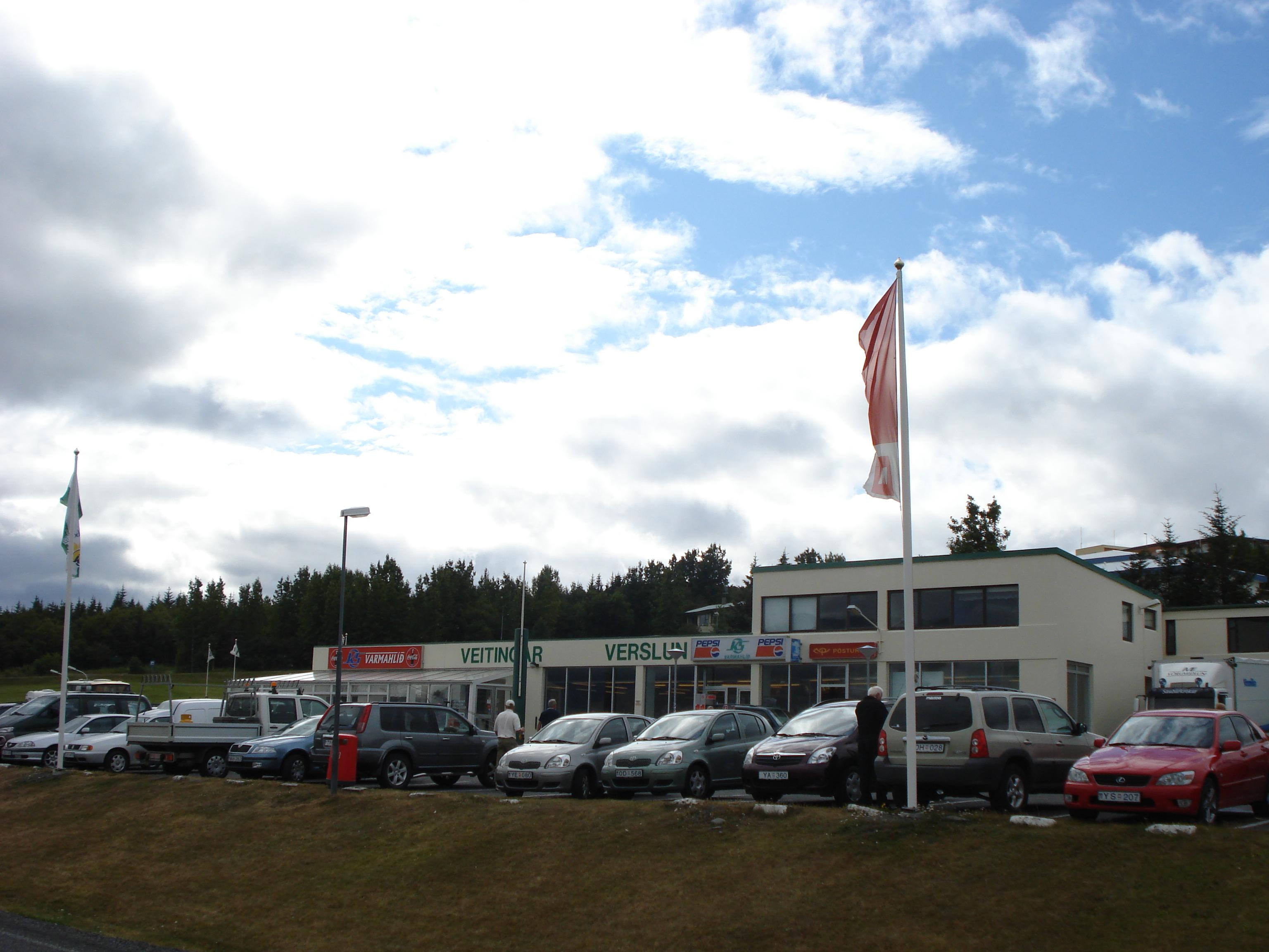 Varmahlíð, Iceland